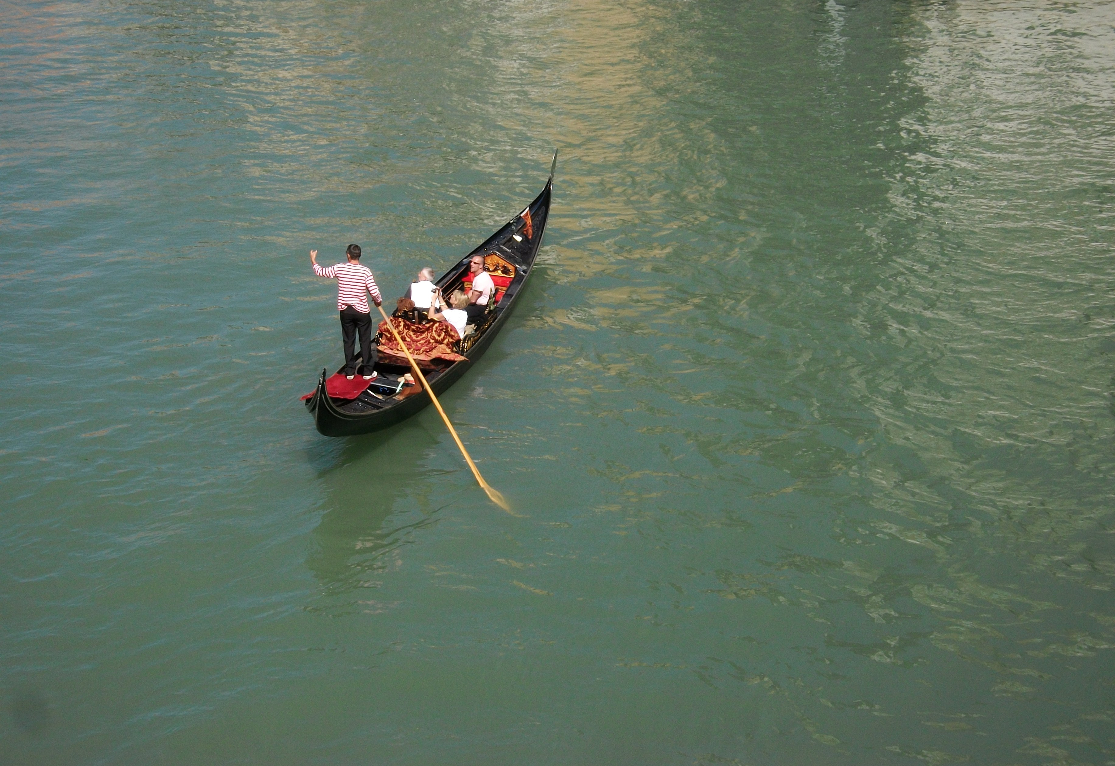 Góndola a Venècia.